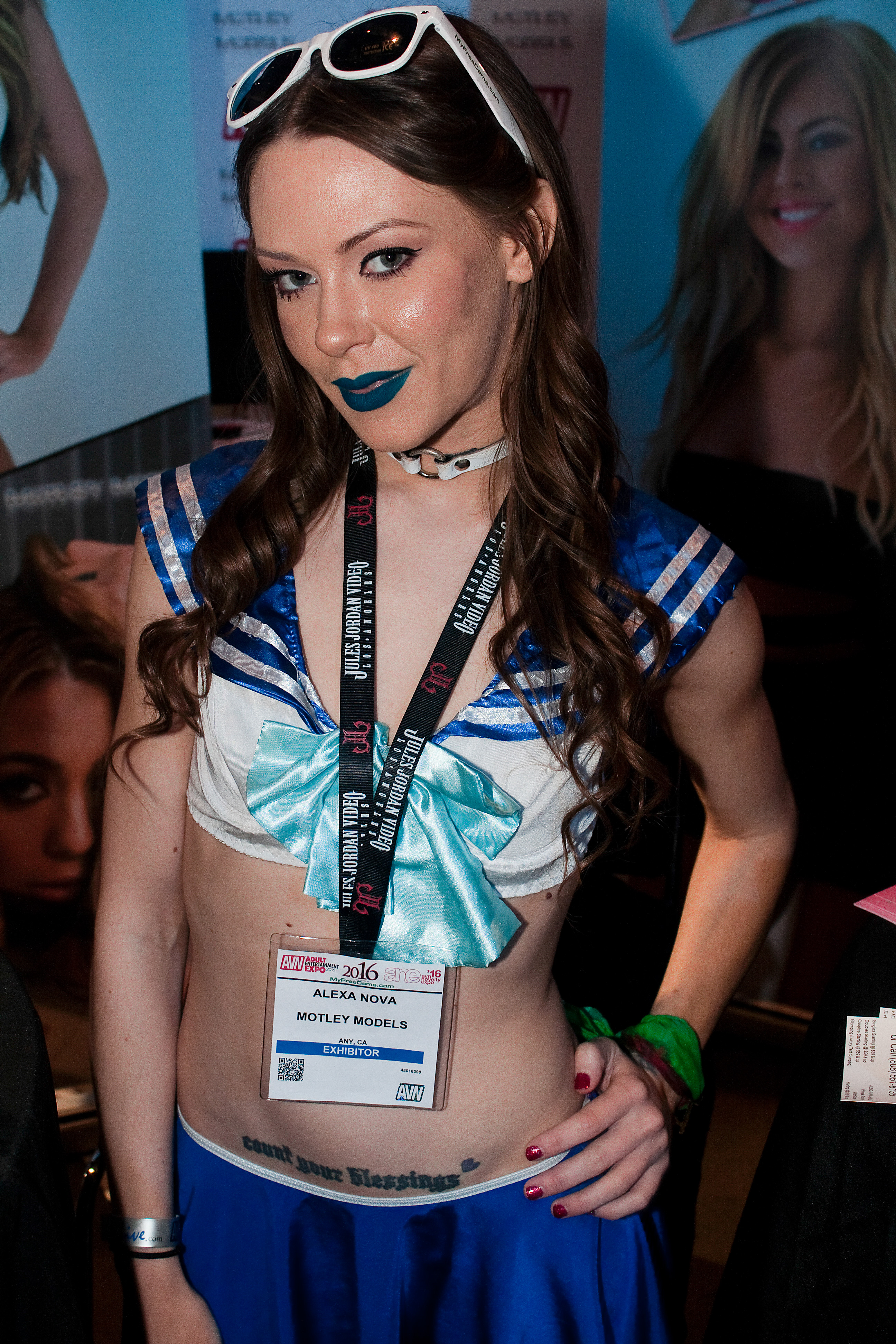 AEE16_0532bas